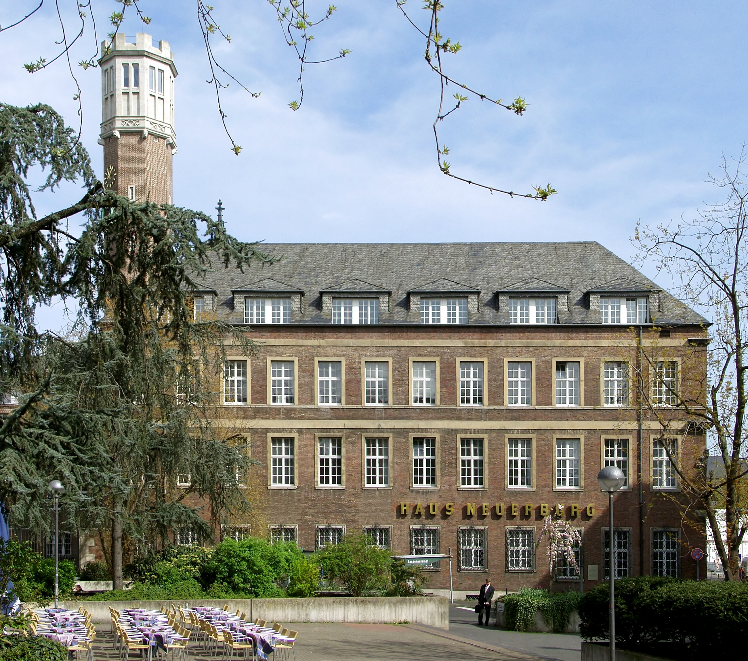 Haus Neuerburg, Köln. Ehemaliges Verwaltungsgebäude der Zigarettenfabrik gleichen Namens, heute beherbergt es Dienststellen der Kölner Stadtverwaltung und des Rates.Architekt: Emil Felix.